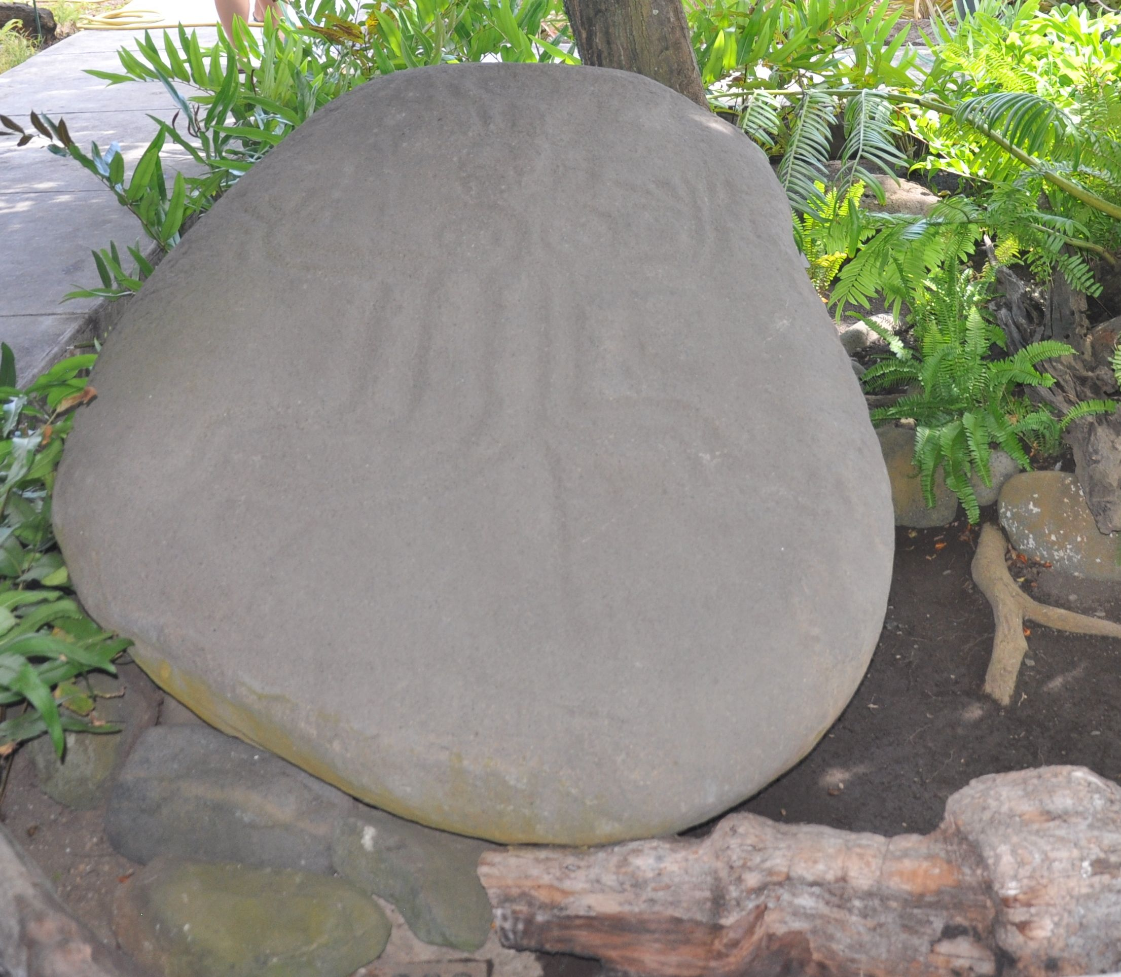 Pétroglyphe des Jumeaux de Tipaerui